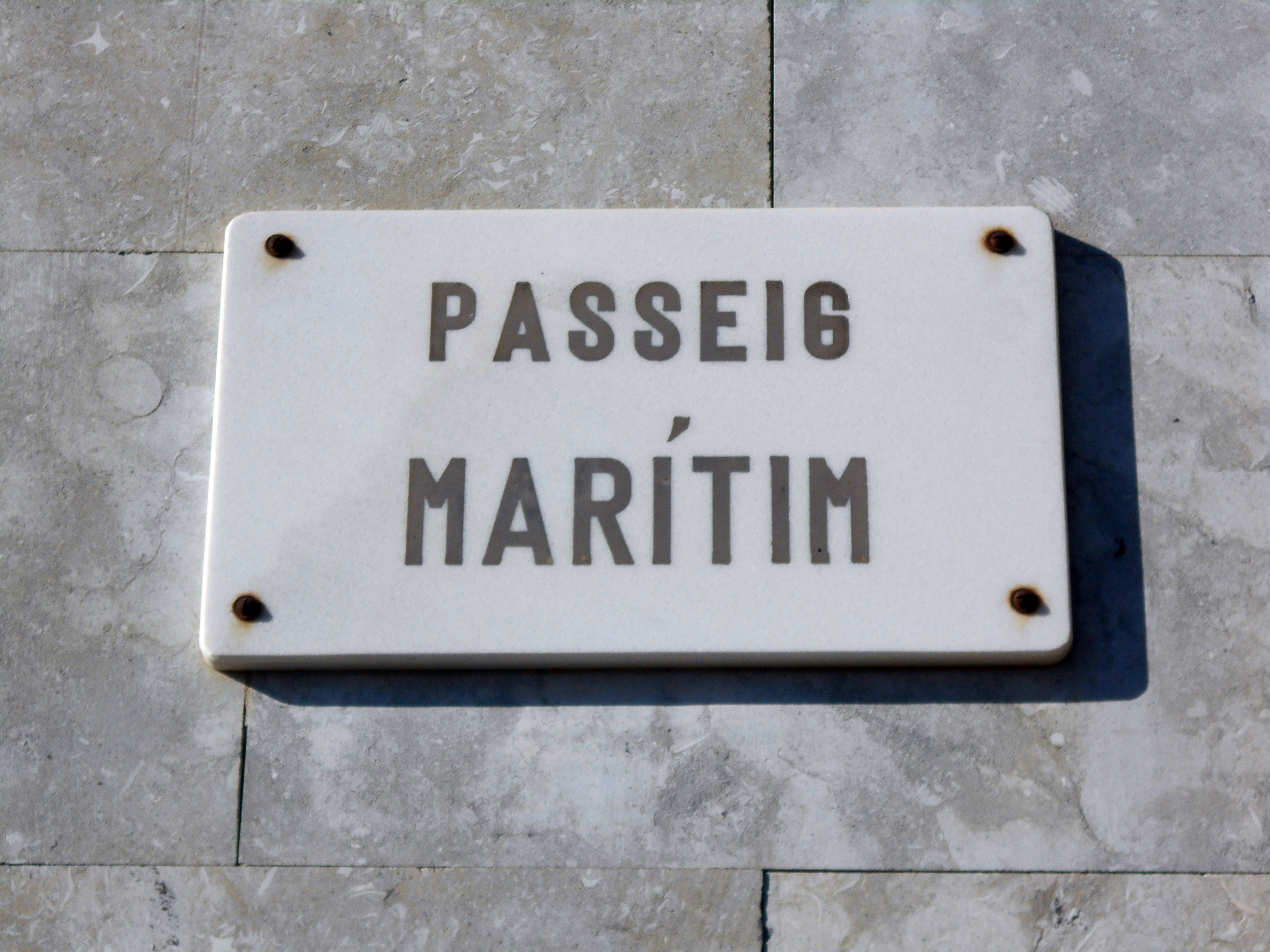 Paseo Marítimo.